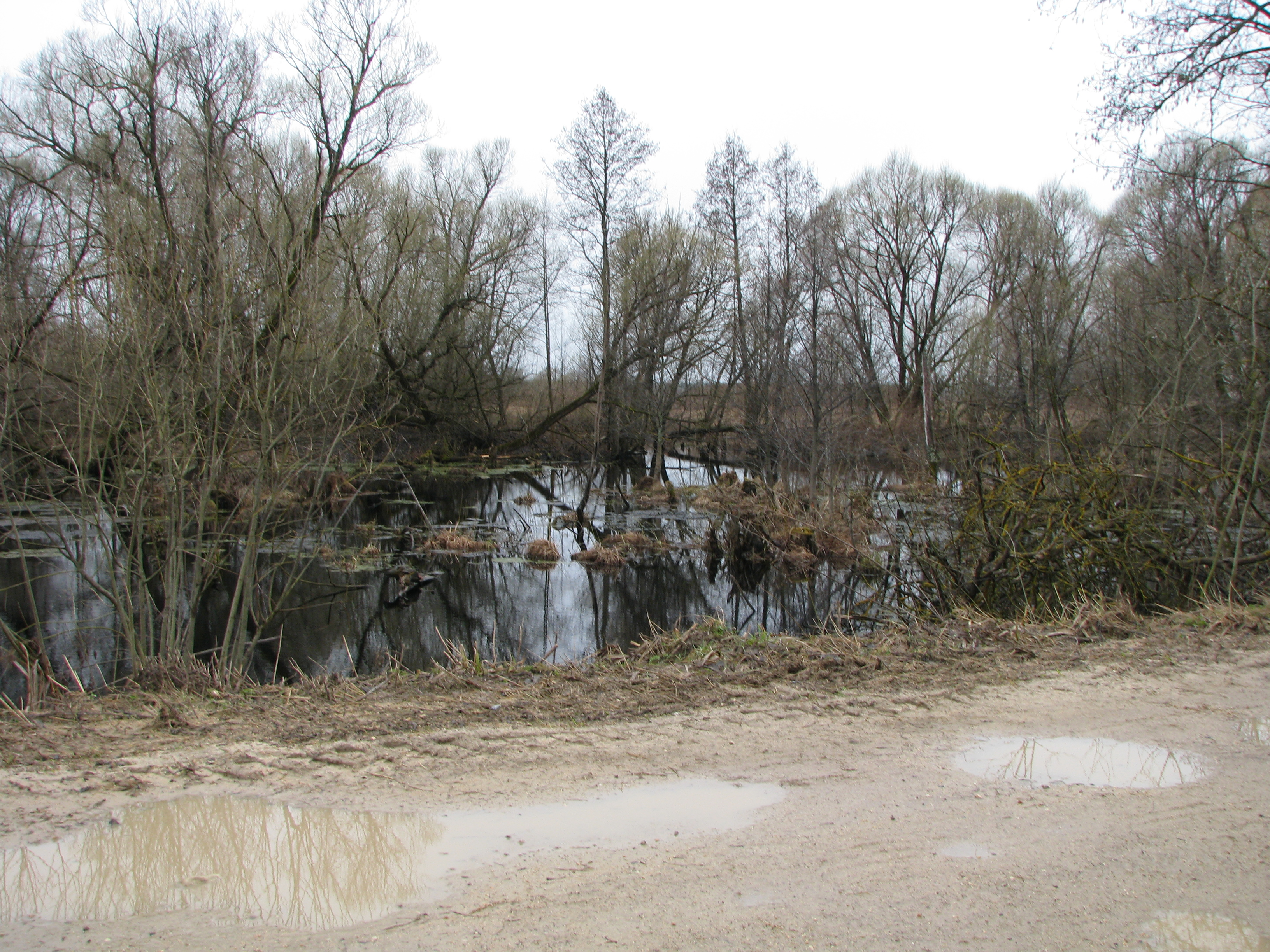 Река Маньшинка, приток Шижегды. Село Лучкино Южского района Ивановской области. Вид с автомобильного моста вниз по течению (на юг).